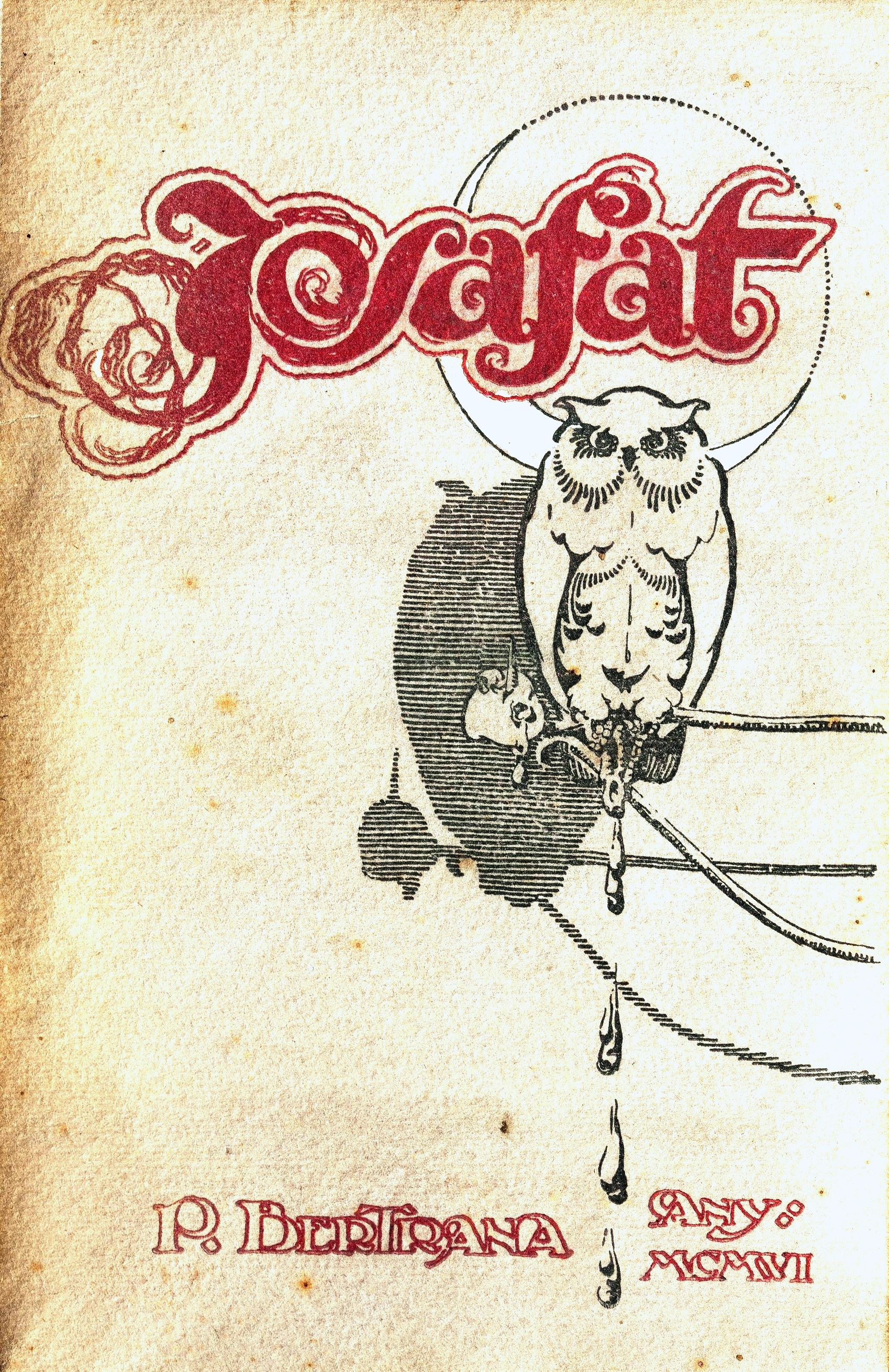 Portada de la primera edición de Josafat, custodiada en la Fundació Rafael Masó